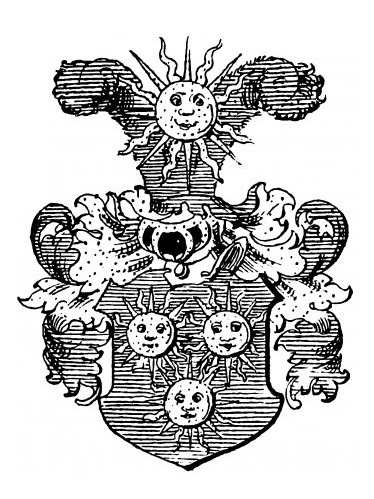 Wappen der von Stoislaff, während zuletzt und seit ziemlich langer Zeit die 3 Schildfiguren in Sonnen bestehen, zeigt z.B. das Siegel des Gotanus Stoislaff von 1340 drei Löwenköpfe, die ja auch sonst in den Wappen mecklenburgischer und rügischer Adelsfamilien vorkommen und in ungekünstelter Darstellung eine Ähnlichkeit mit Sonnen haben, wie auch umgekehrt.